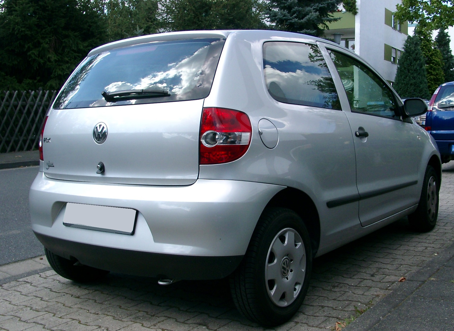 VW Fox